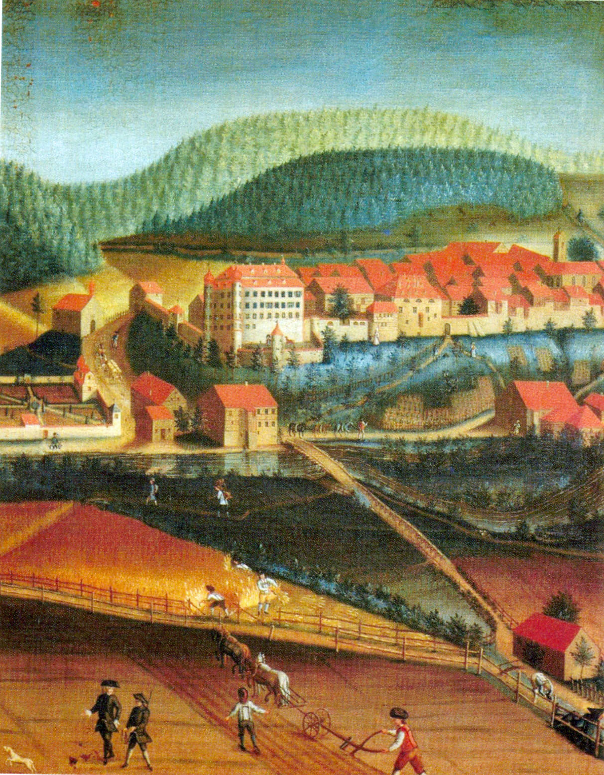 Mühlheim an der Donau mit dem Schloss der Freiherren von Enzberg Ölgemälde